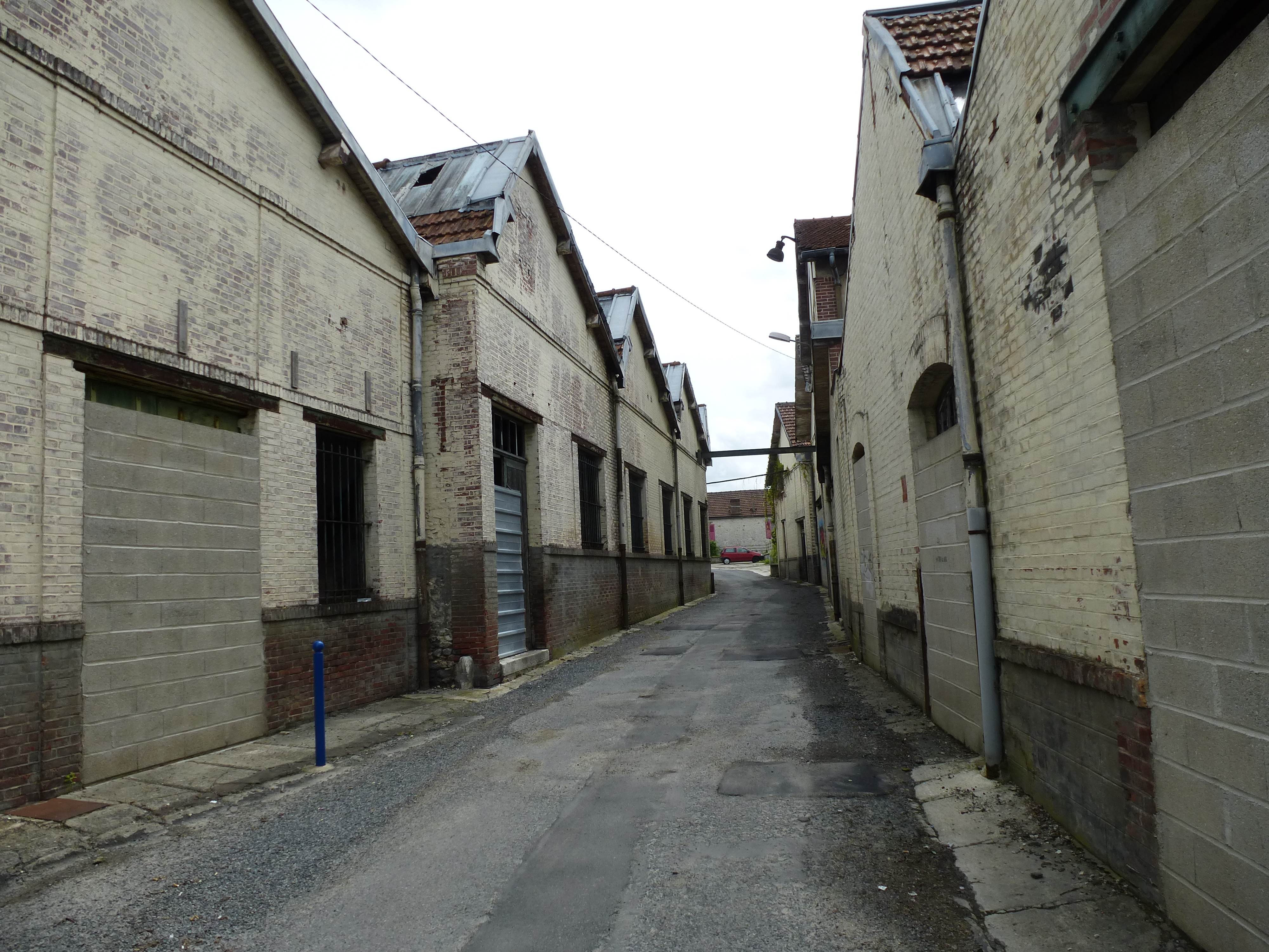 Friche industrielle à Longueville. (département de la Seine et Marne, région Île-de-France).